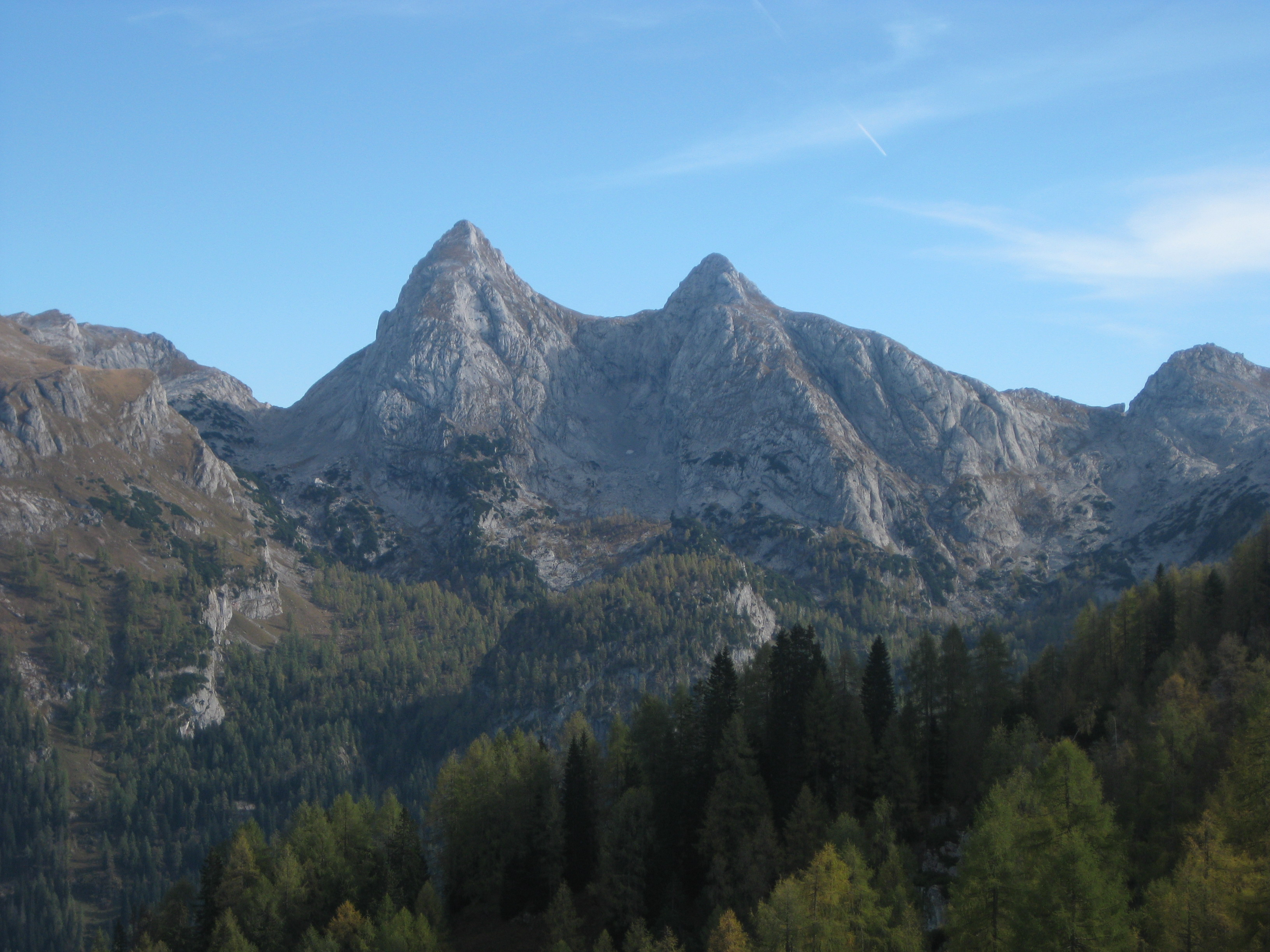 Die Teufelshörner in den Berchtesgadener Alpen, gesehen vom Halsköpfl: Großes Teufelshorn (2363 m, links) und Kleines Teufelshorn (2283 m, rechts).